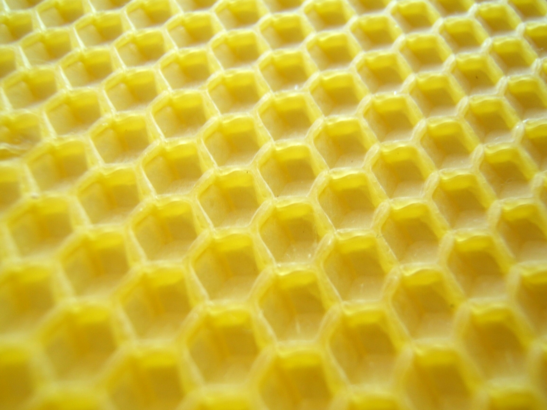 Description close-up van plaat bijenwas, diameter één raat: 5 à 6 mm Date21 September 2006SourceOwn workAuthornl:Gebruiker:AlgontPermission (Reusing this file) GFDL close-up van plaat bijenwas, diameter één raat: 5 à 6 mm